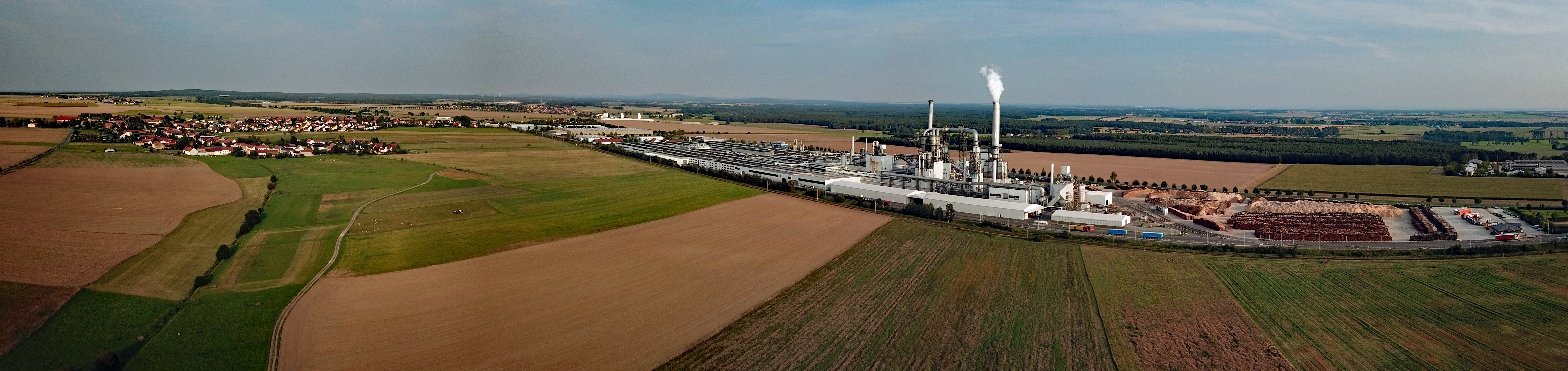 Lampertswalde (Landkreis Meißen, Sachsen) und Industriegebiet mit Kronospan